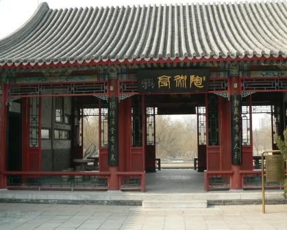 陶然亭。